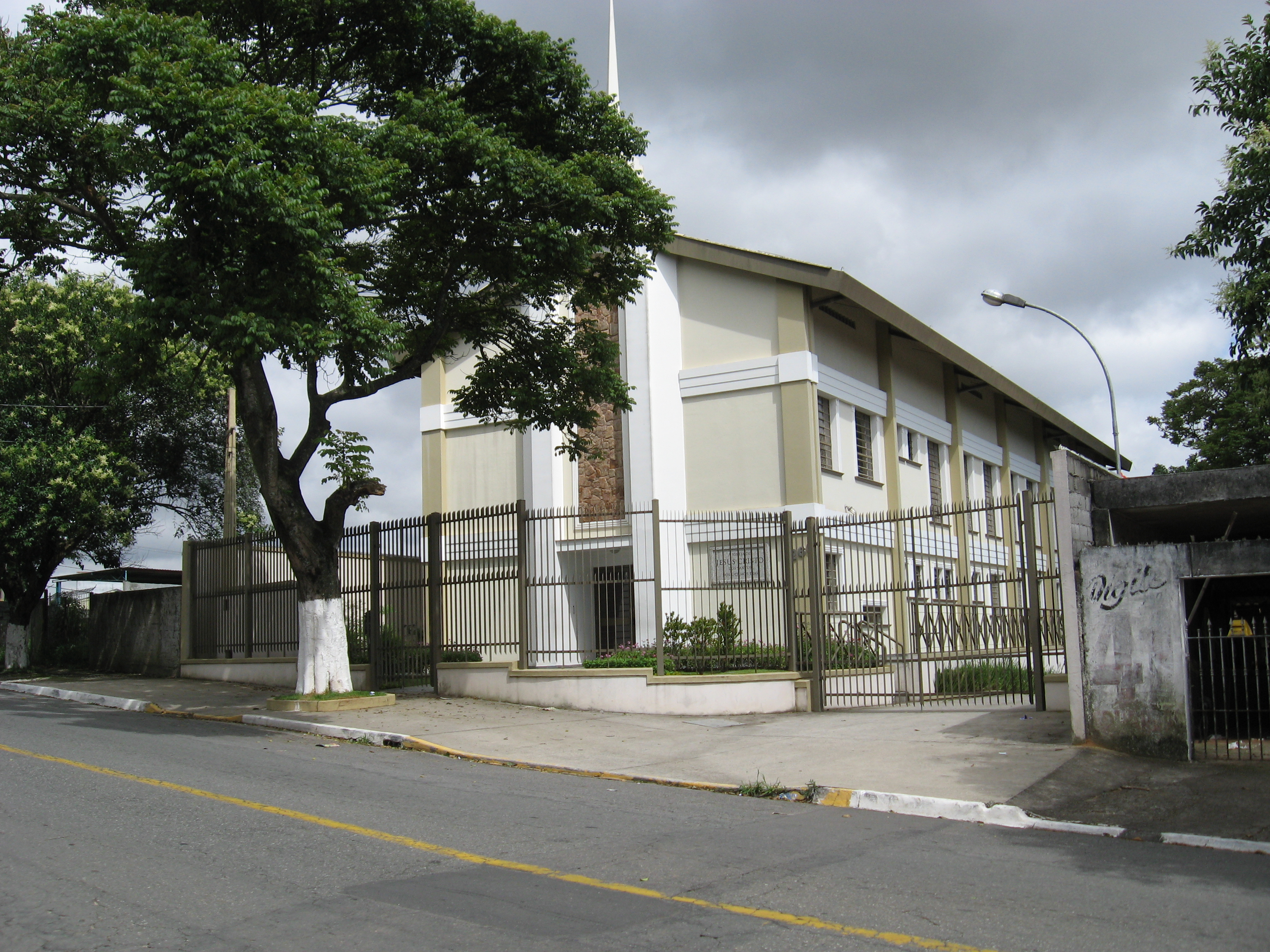 Templo Mórmom